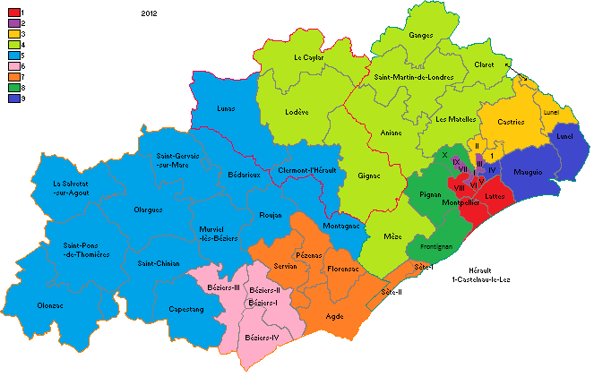 Circonscriptions héraultaises en 2012 (version corrigée)